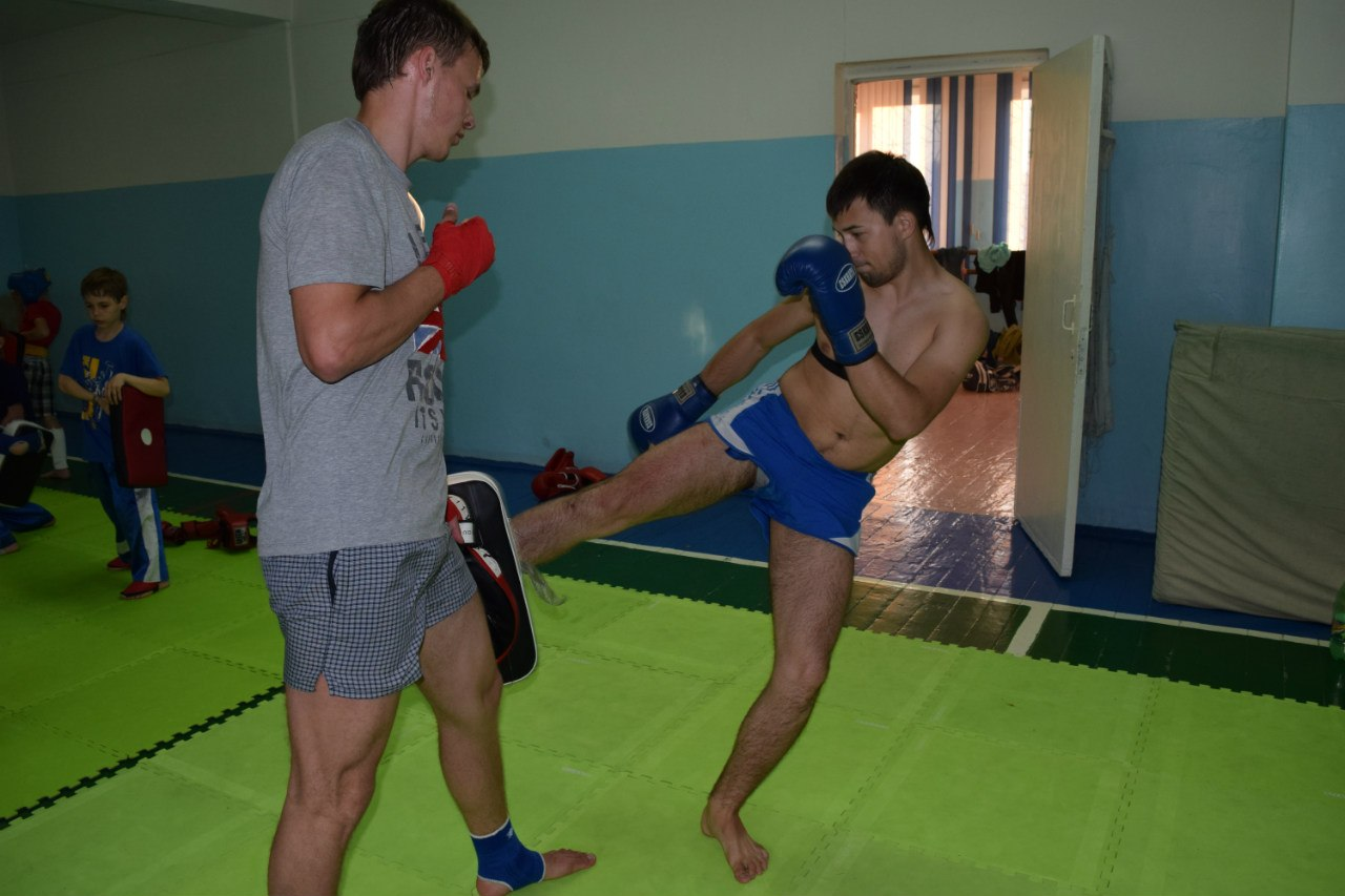 удар лоу кик в кикбоксинге и такйском боксе